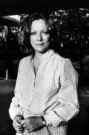 Fotografía capturada por Vasco Szinetar en la Universidad Central de Venezuela